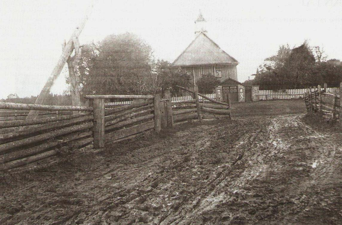 Беларуская (тарашкевіца): Руднікі (Rudniki). Касьцёл Найсьвяцейшай Тройцы